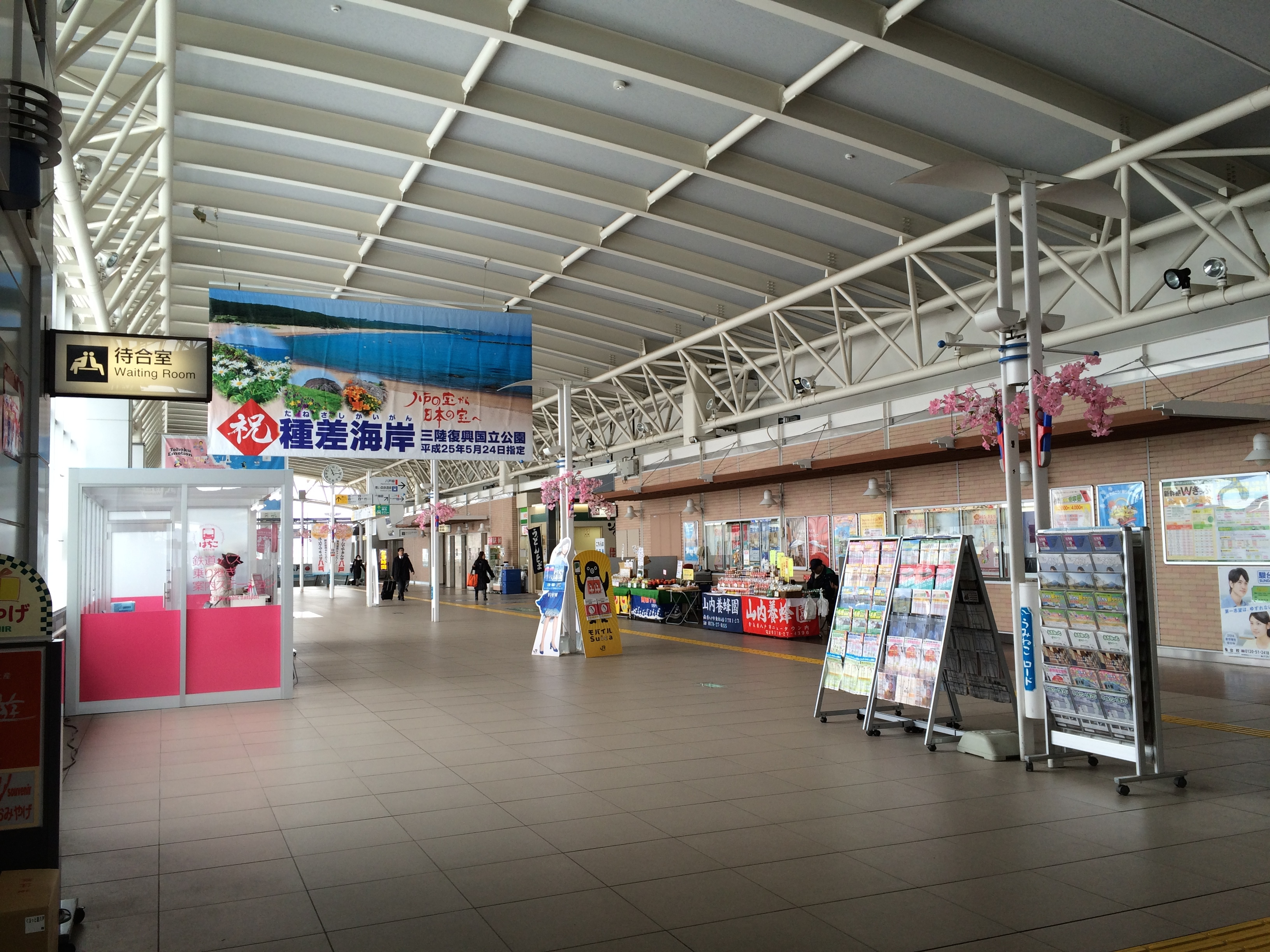 八戸駅うみねこロード